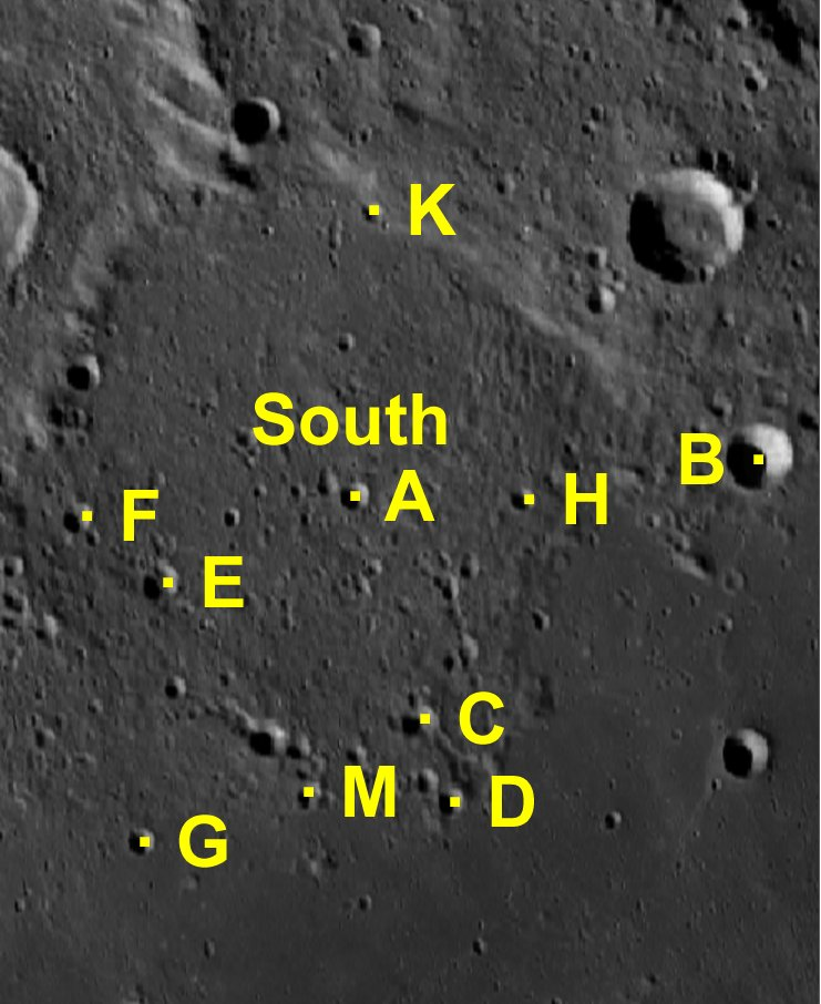 Cráter lunar South. Cráteres satélite. (Imagen LRO)